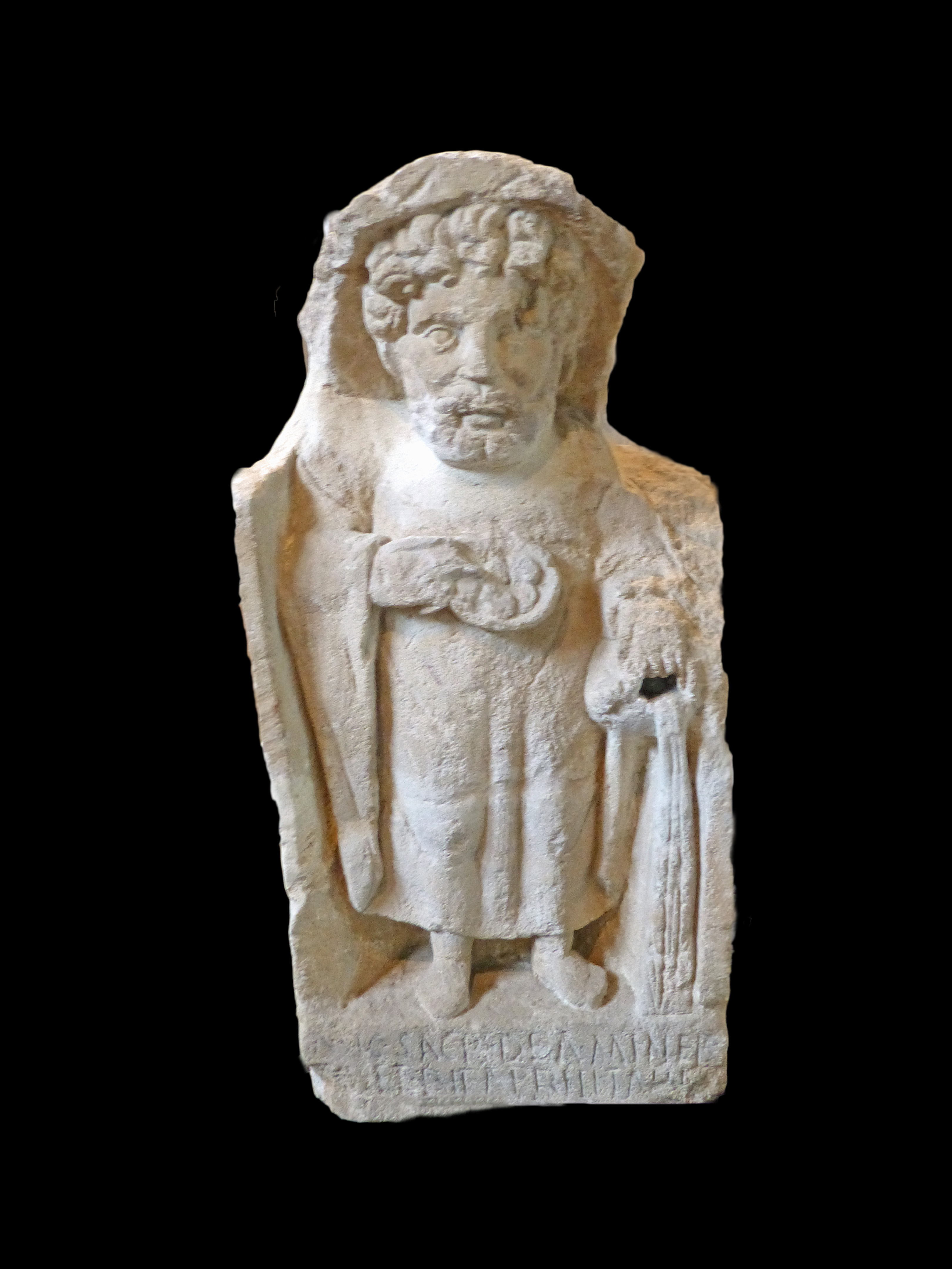 Abbaye Saint-Germain d'Auxerre : stèle funéraire d'homme debout barbu. En provenance de Crain (Yonne). L'inscription indique une dédicace à Minerve. Calcaire. N° d'inventaire : 859.1